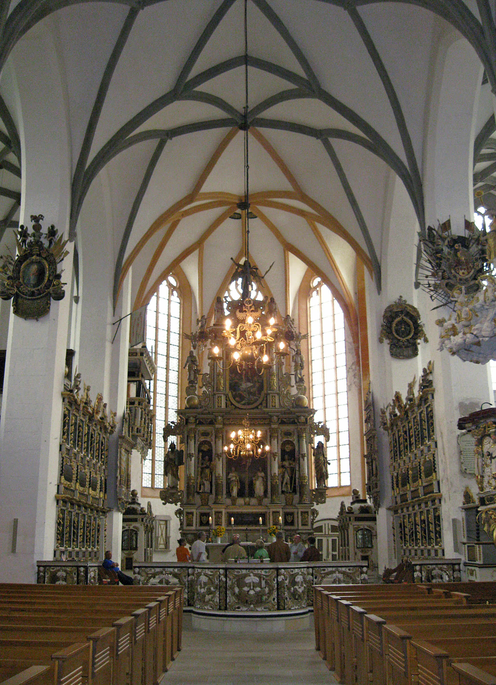 Im Inneren der St.-Johannis-Kirche – im Hintergrund der 12 Meter hohe Hochaltar.